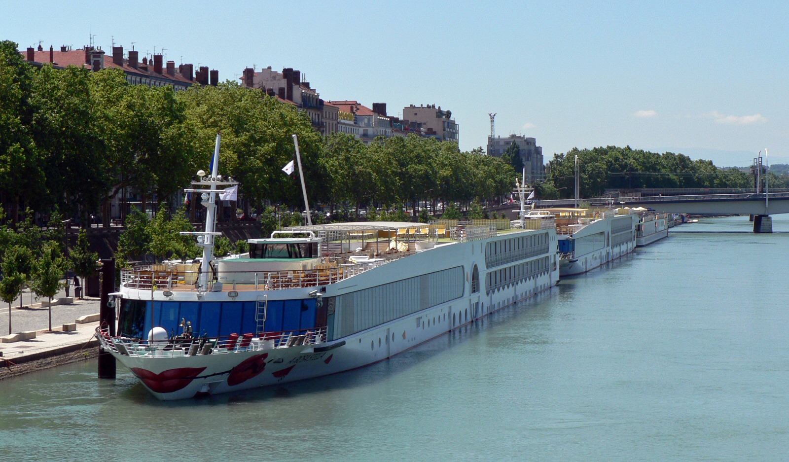 A'Rosa Stella auf der Rhône am Anleger in Lyon. Dahinter ihr Schwesterschiff A'Rosa Luna.